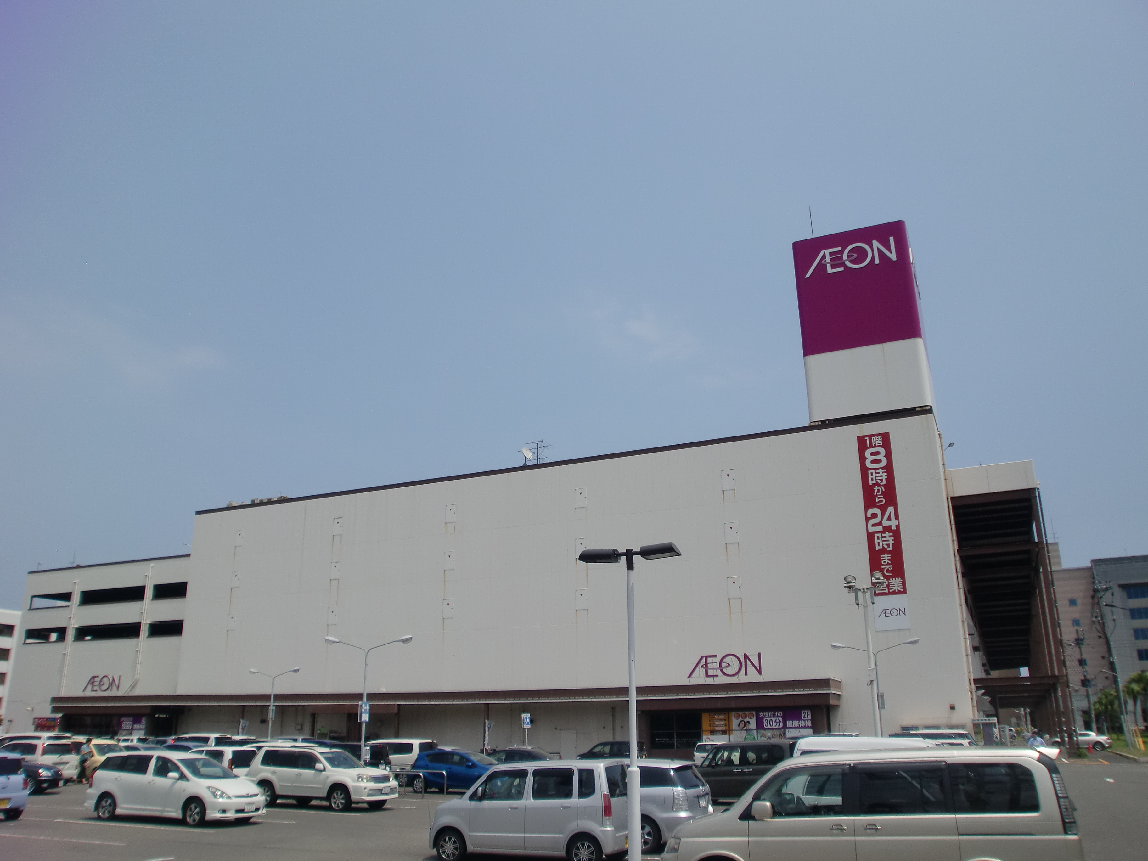 イオン鹿児島谷山店の外観